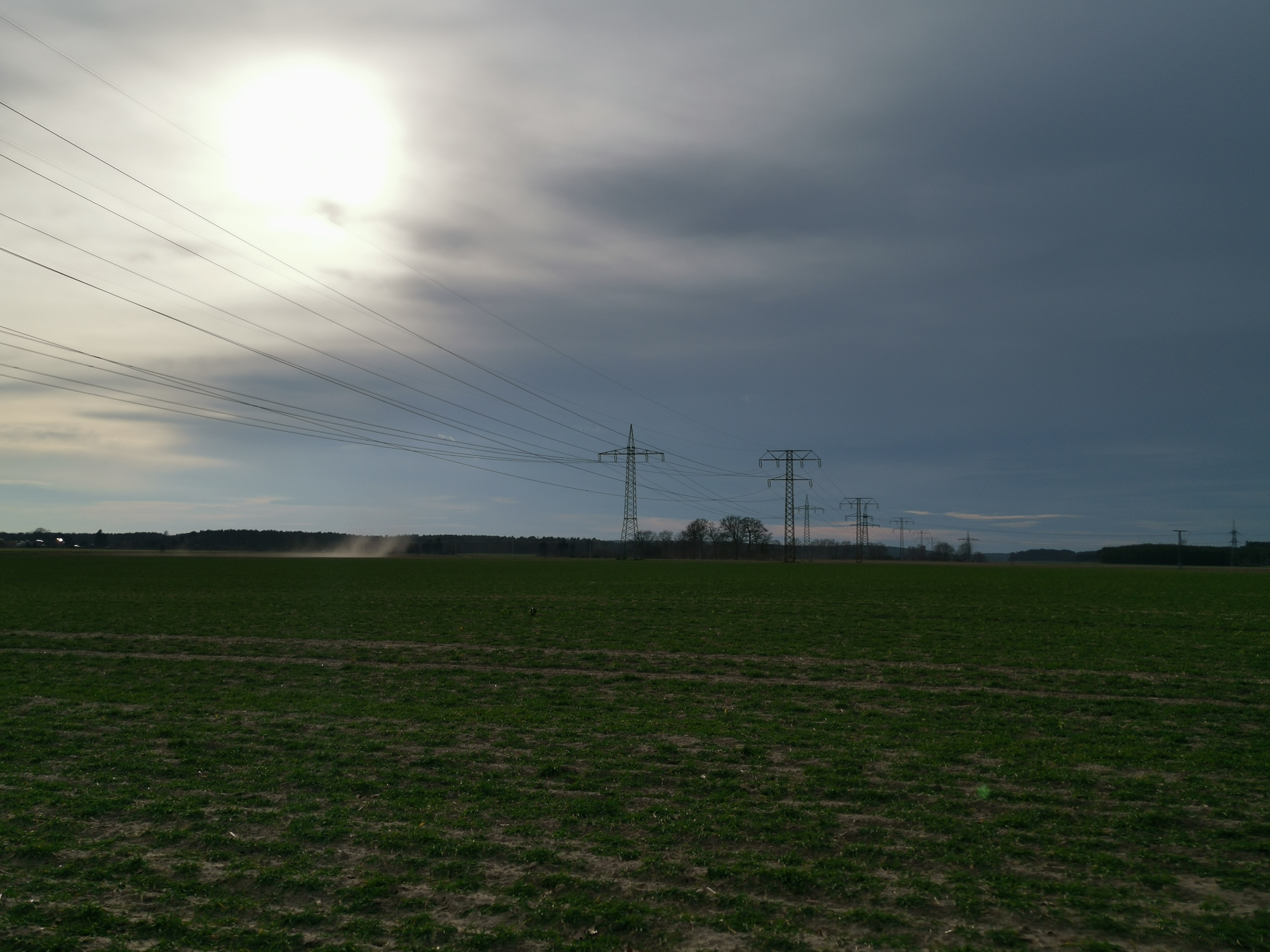 Strommasten bei Nitzahn und Wetterverhältnisse im Norden Deutschlands am 9. Februar 2020 (Vortag von Orkan Sabine).